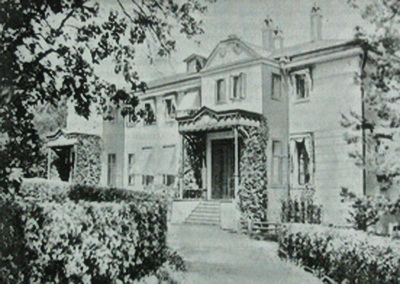 Главный дом усадьбы Плещеевых